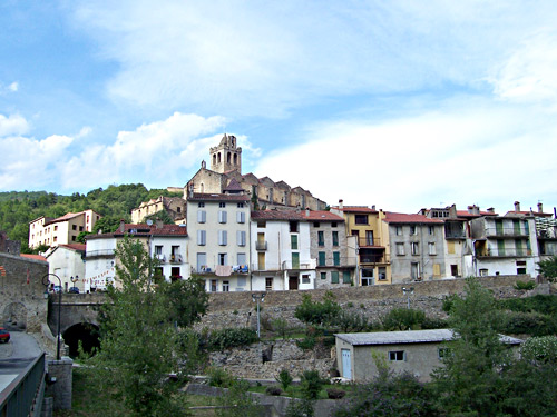 Prats de Mollo la Preste, village des Pyrénées orientales